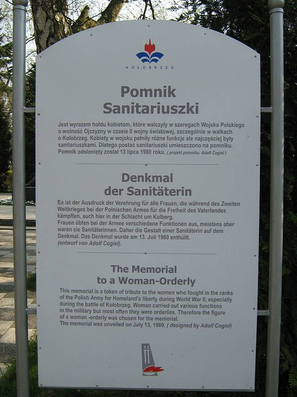 Pomnik sanitariuszki w Kołobrzegu, tablica informacyjna.